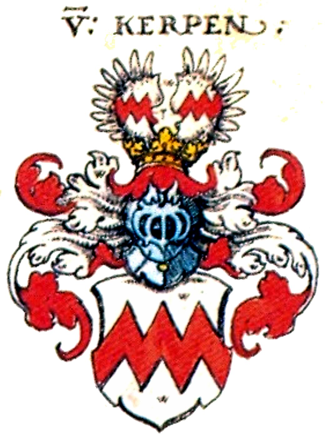 Johann Siebmacher: New Wappenbuch eingescannt aus: Horst Appuhn (Hrsg.), Johann Siebmachers Wappenbuch. Die bibliophilen Taschenbücher 538, 2. verb. Aufl , Dortmund 1989 Rheinische Blatt 127